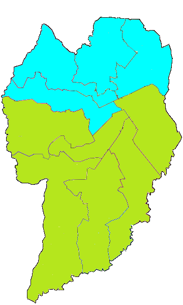 Resultado do primeiro turno da eleição para a Prefeitura de Curtiba em 2012. Em verde locais mais votados para Ratinho Jr., em azul mais votado foi Gustavo Fruet.